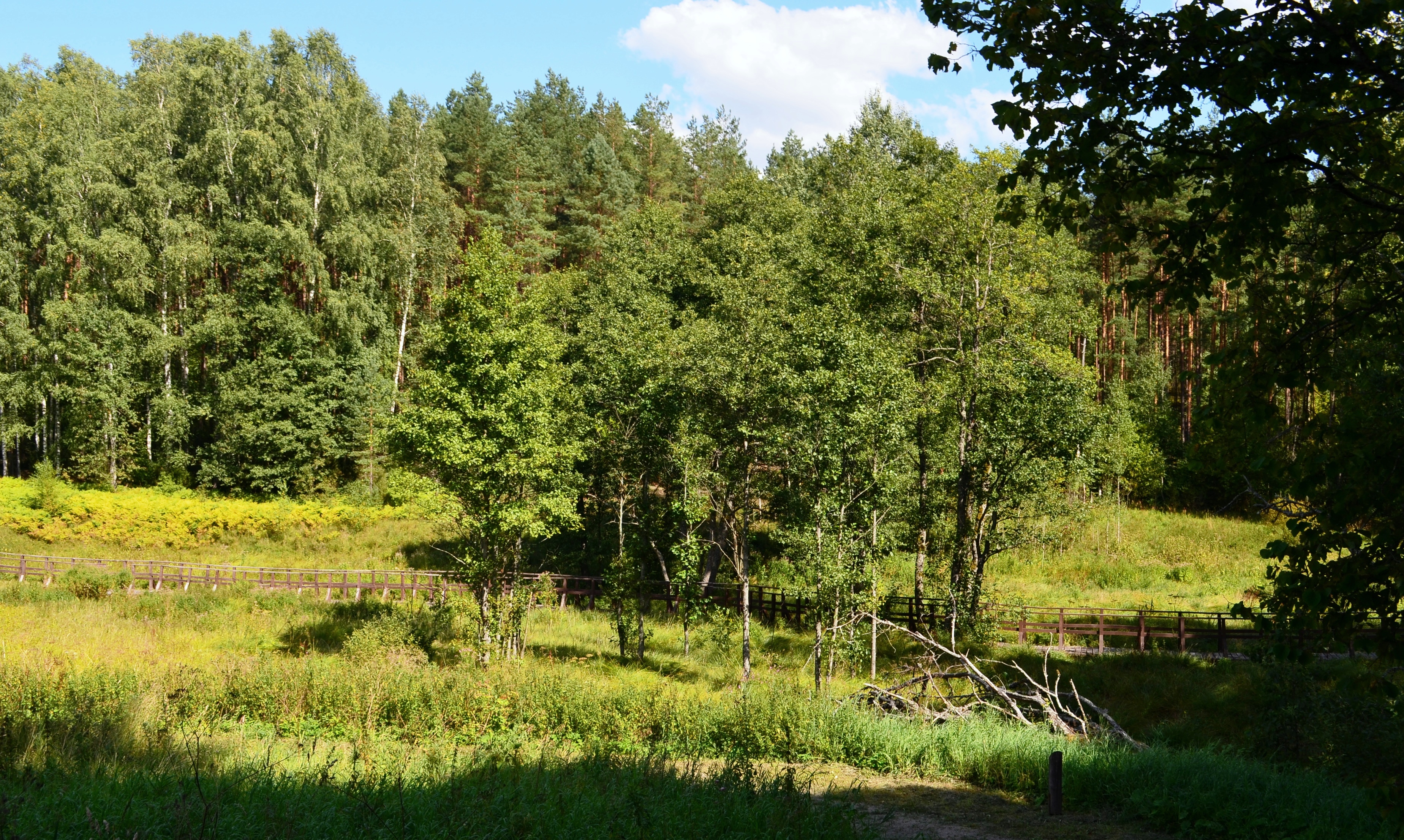 Bobos daržo šaltinis (Skroblaus versmės), Margionys, Varėnos r.